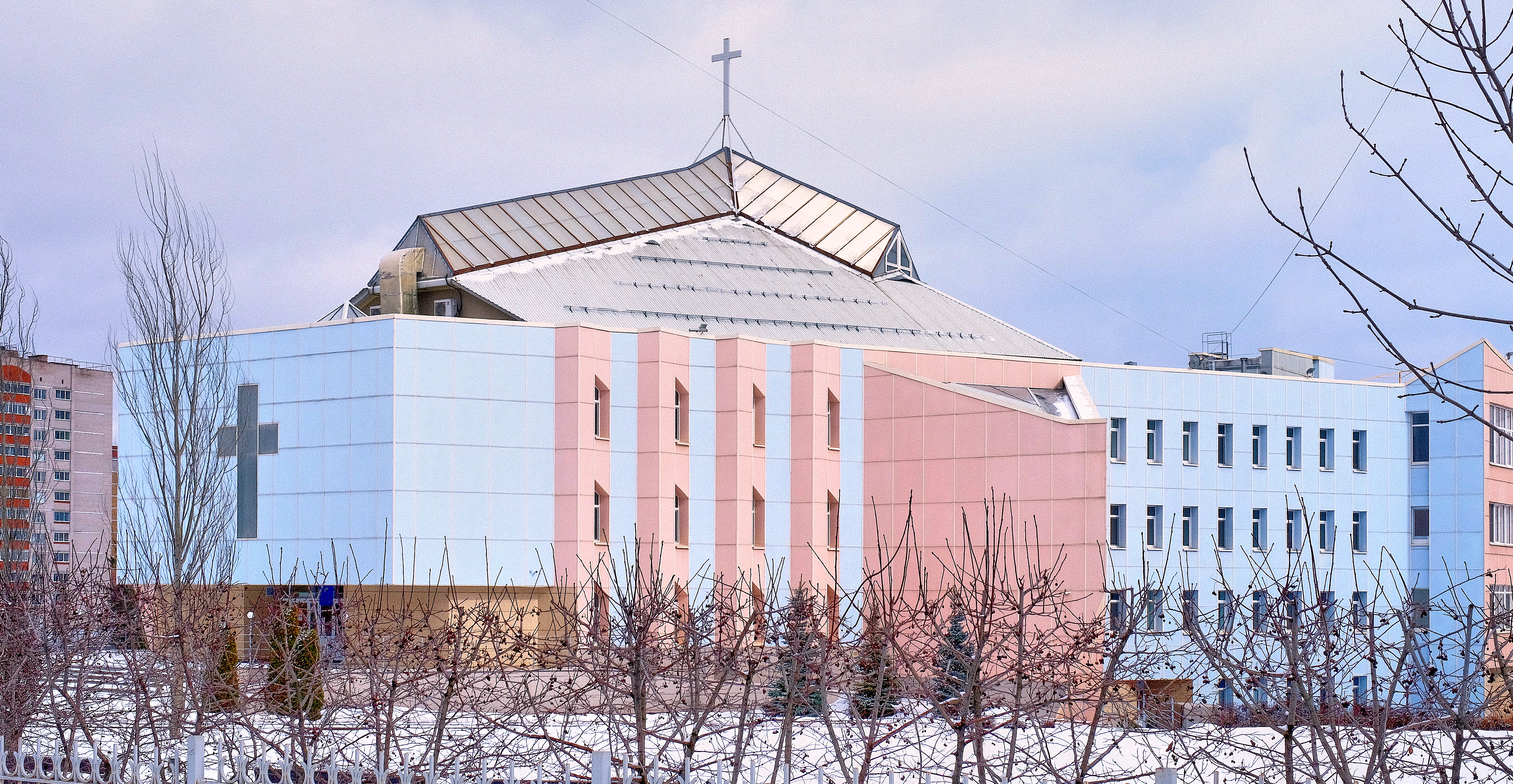 Протестантская церковь "Филадельфия" в Ижевске